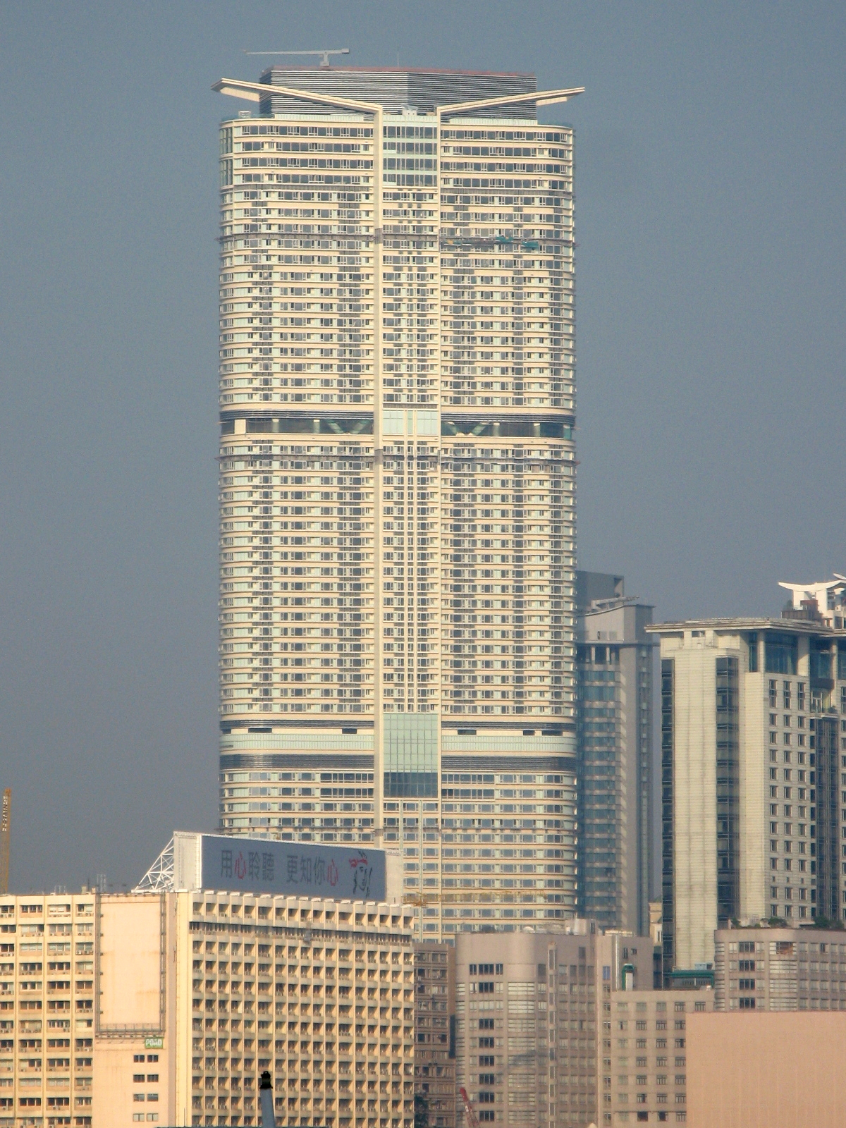 香港尖沙咀凱悅酒店 Hyatt Regency Hong Kong, Tsim Sha Tsui